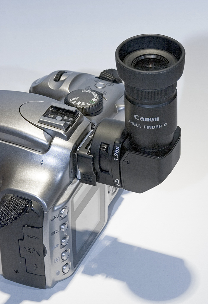 Wénkelsucher vu Canon